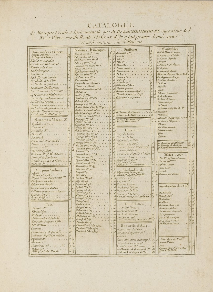 Catalogue 1764 de l'éditeur parisien La Chevardière